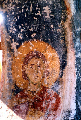 Фреска от Базиликата на оглашените в Сервия, Гърция.